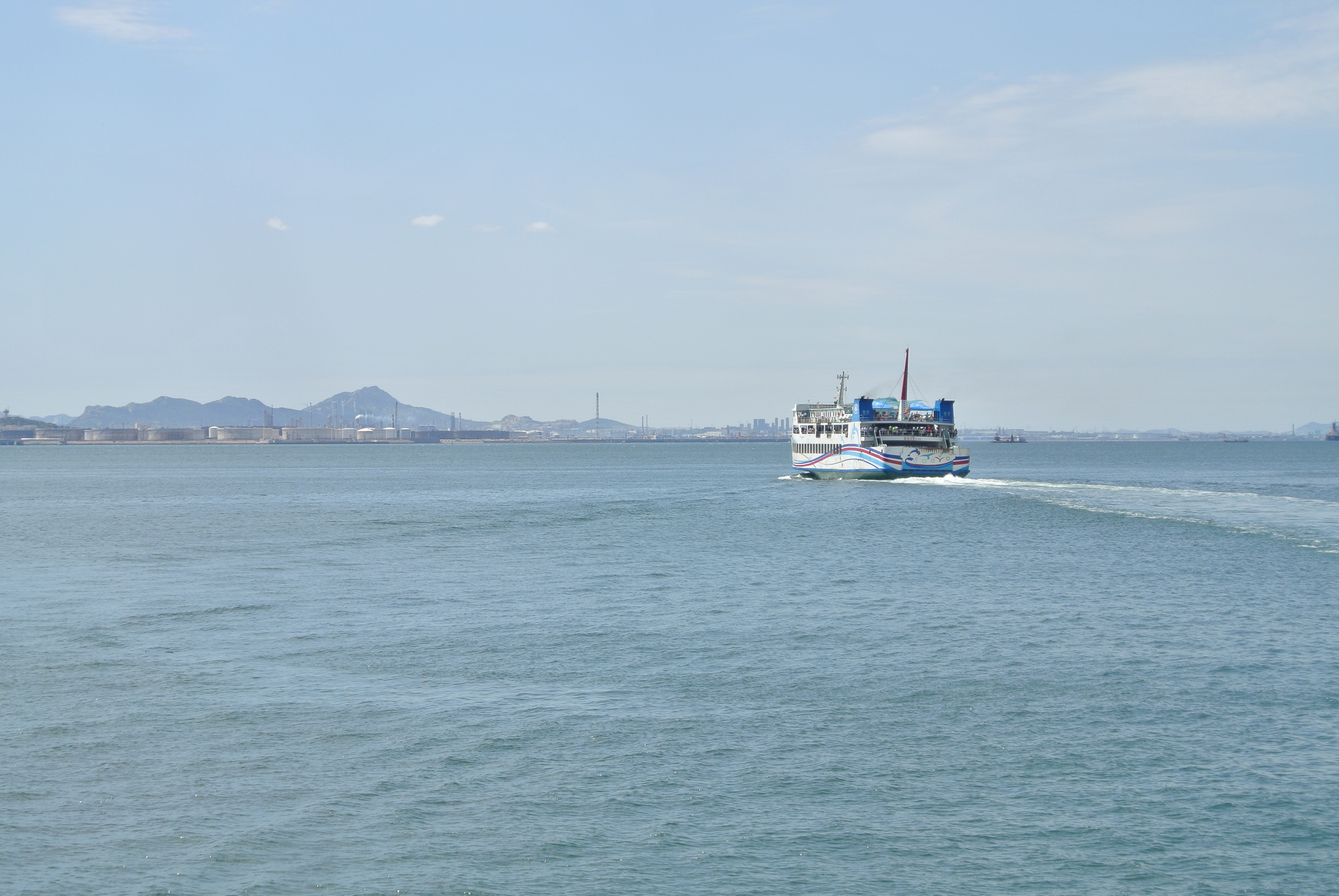 驶向黄岛的鲁胶渡1号